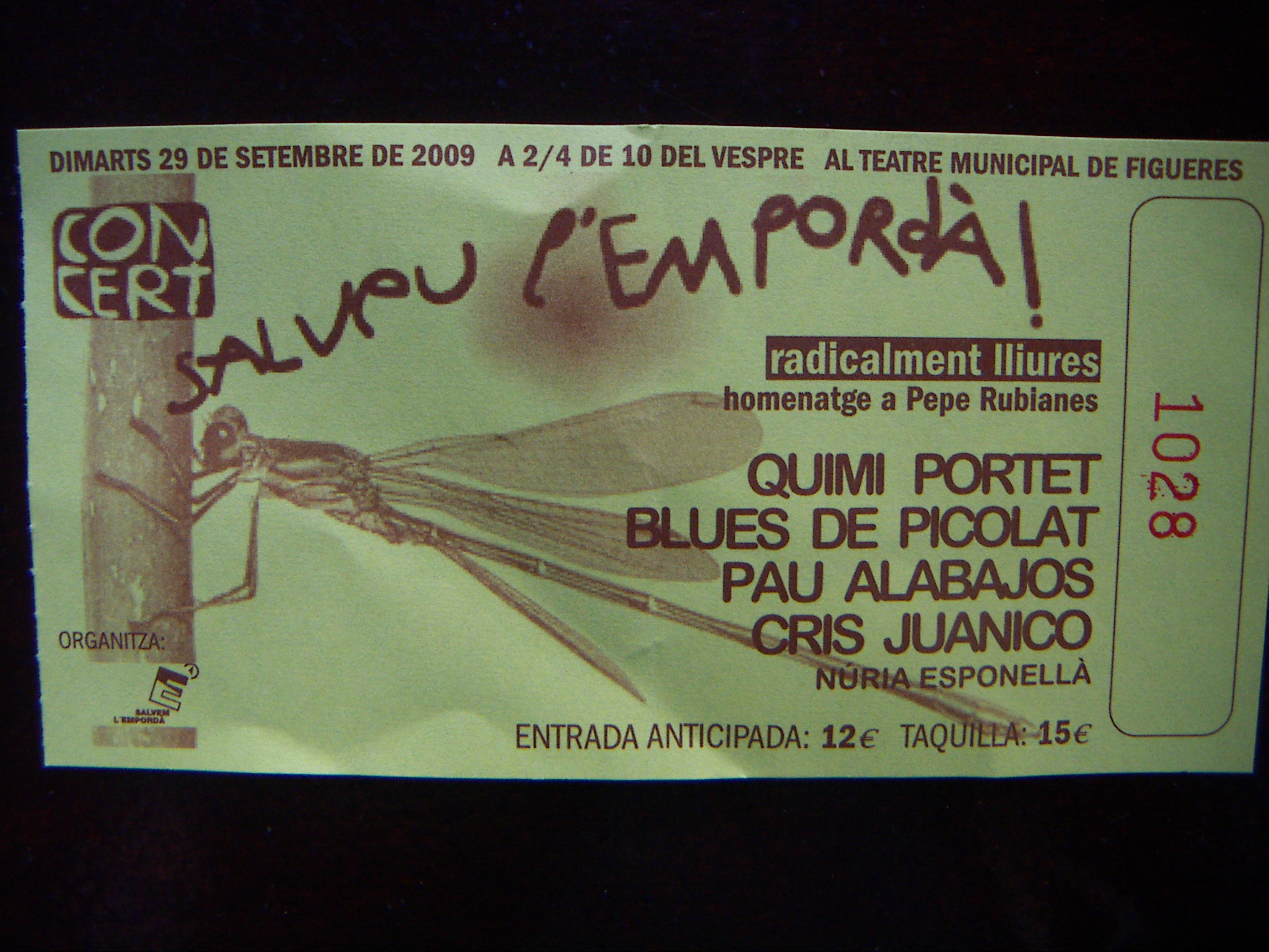 Entrada al concert per recaptat fons per Salvem l'Empordà